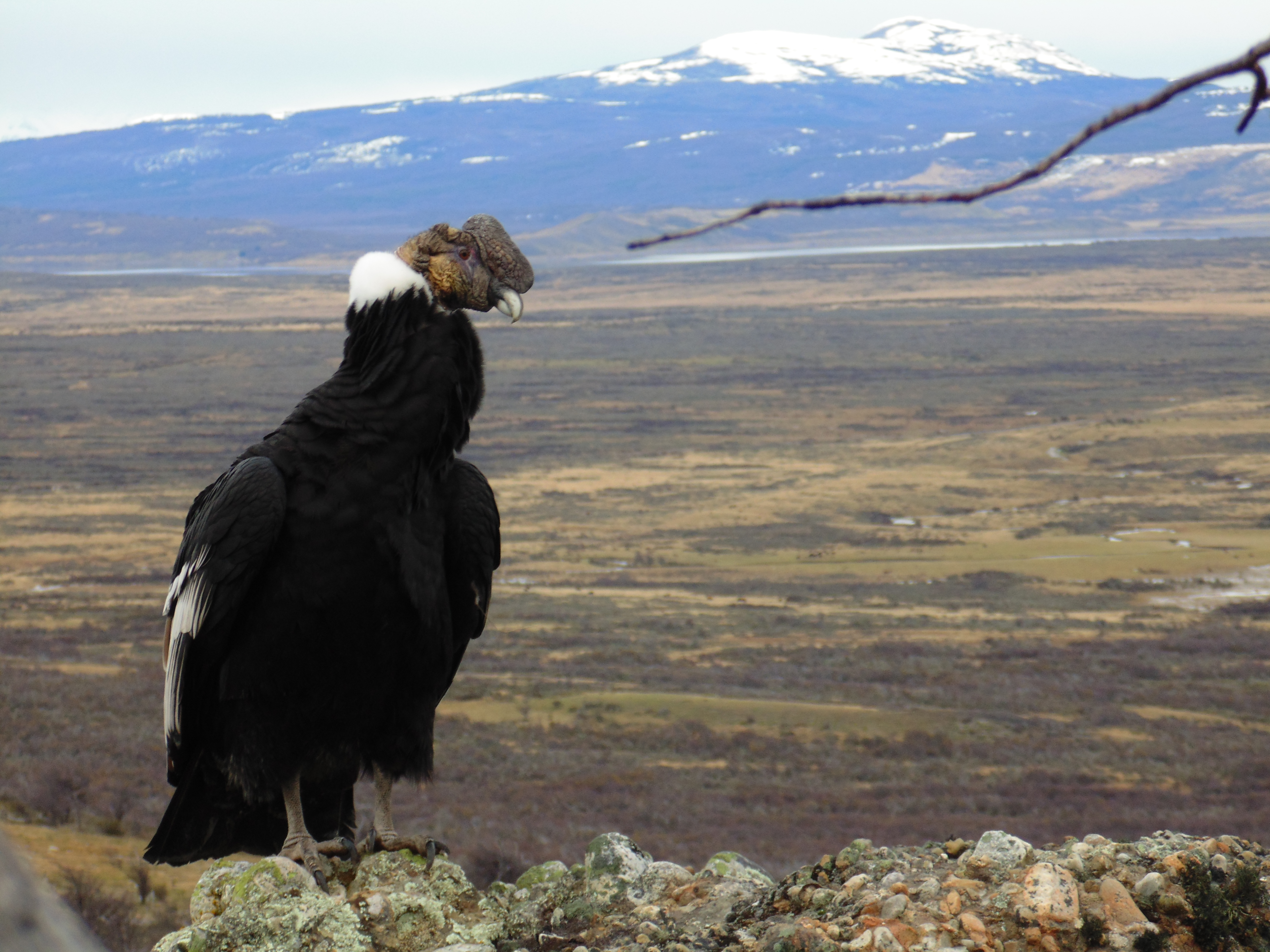 Monumento natural Cueva del Milodón